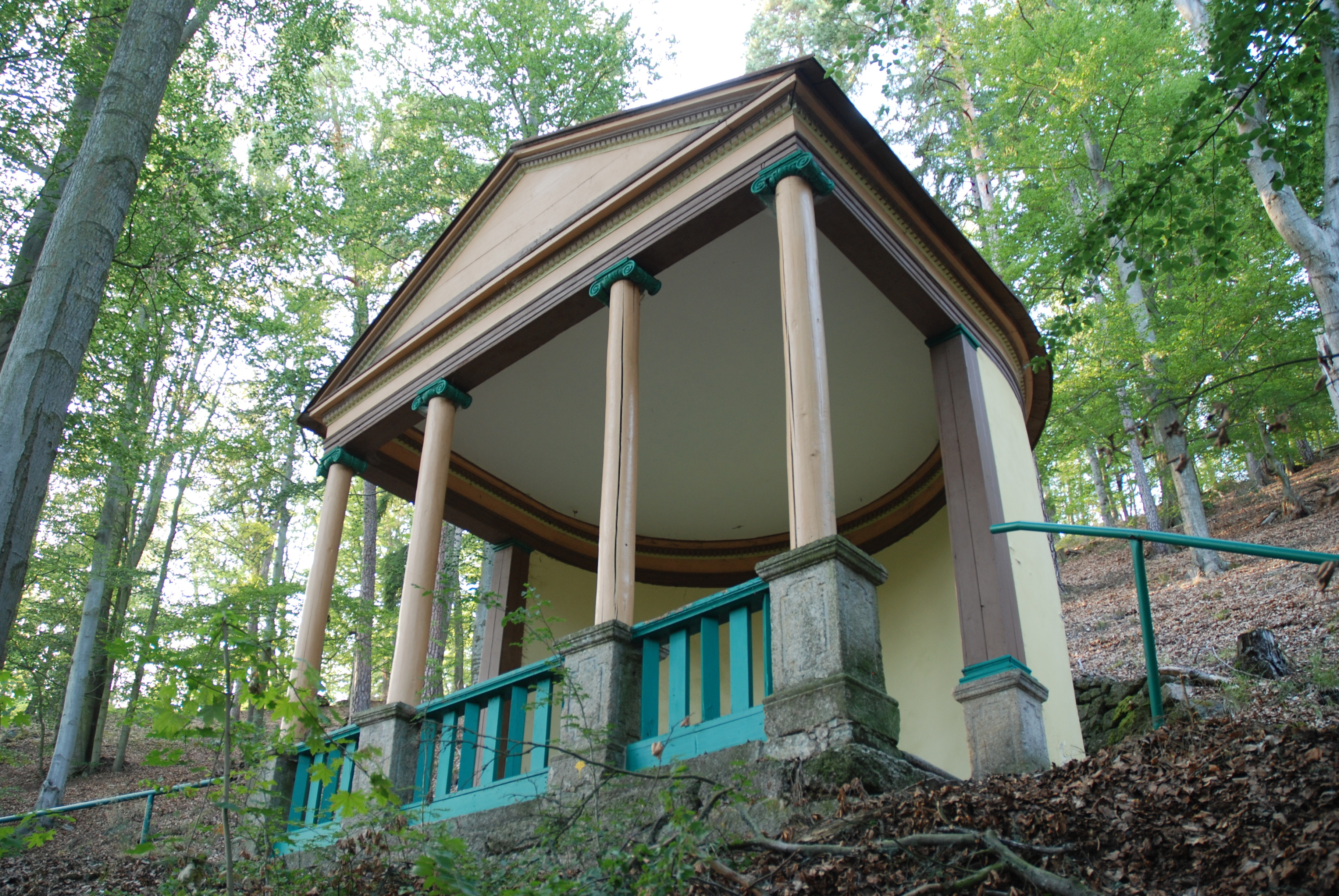 Findlaterův altán v karlovarských lázeňských lesích na Findlaterově stezce